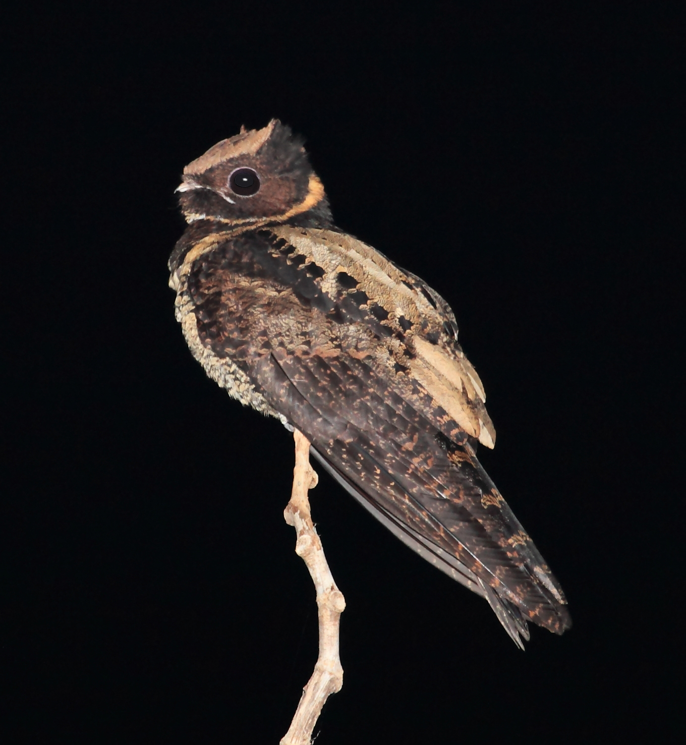 Great Eared-Nightjar, Tangkoko, Sulawesi